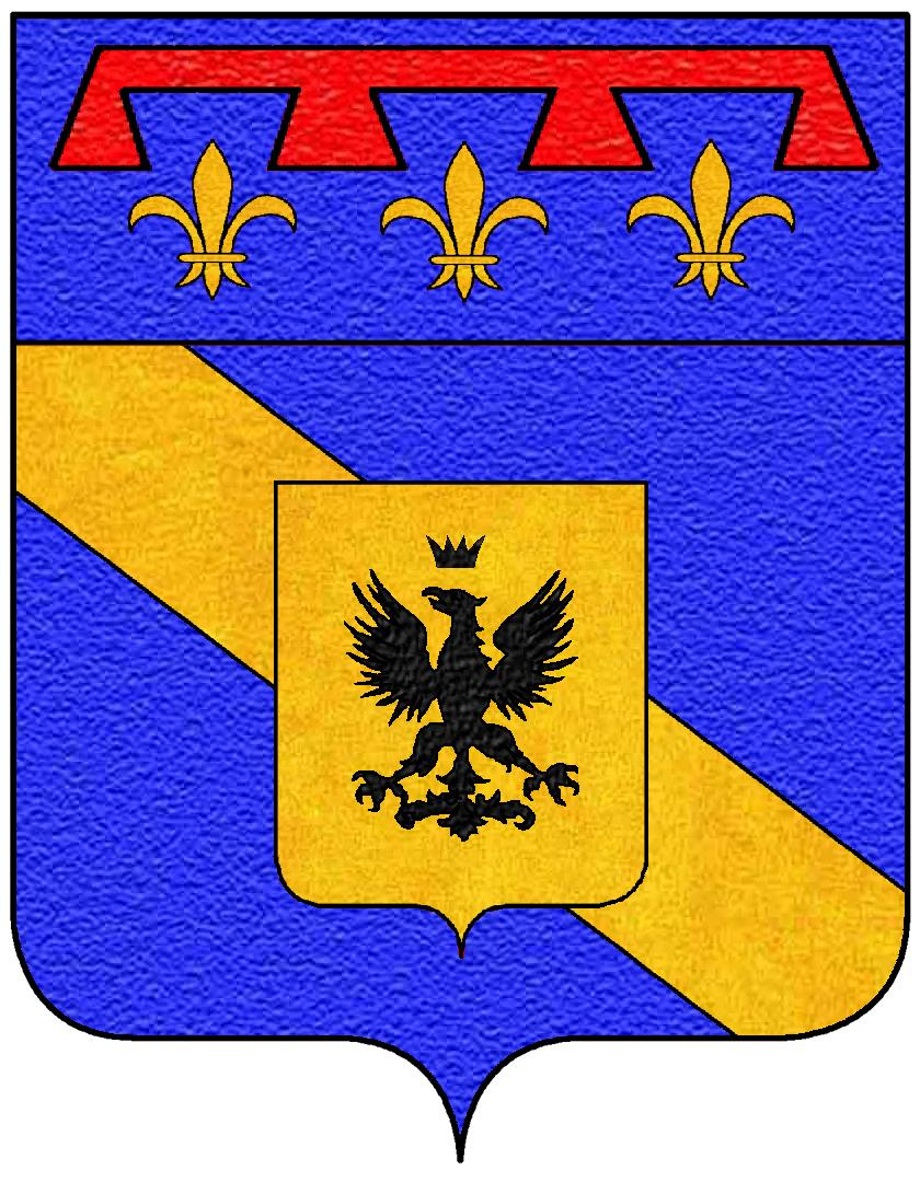 Stemma della famiglia Malvezzi